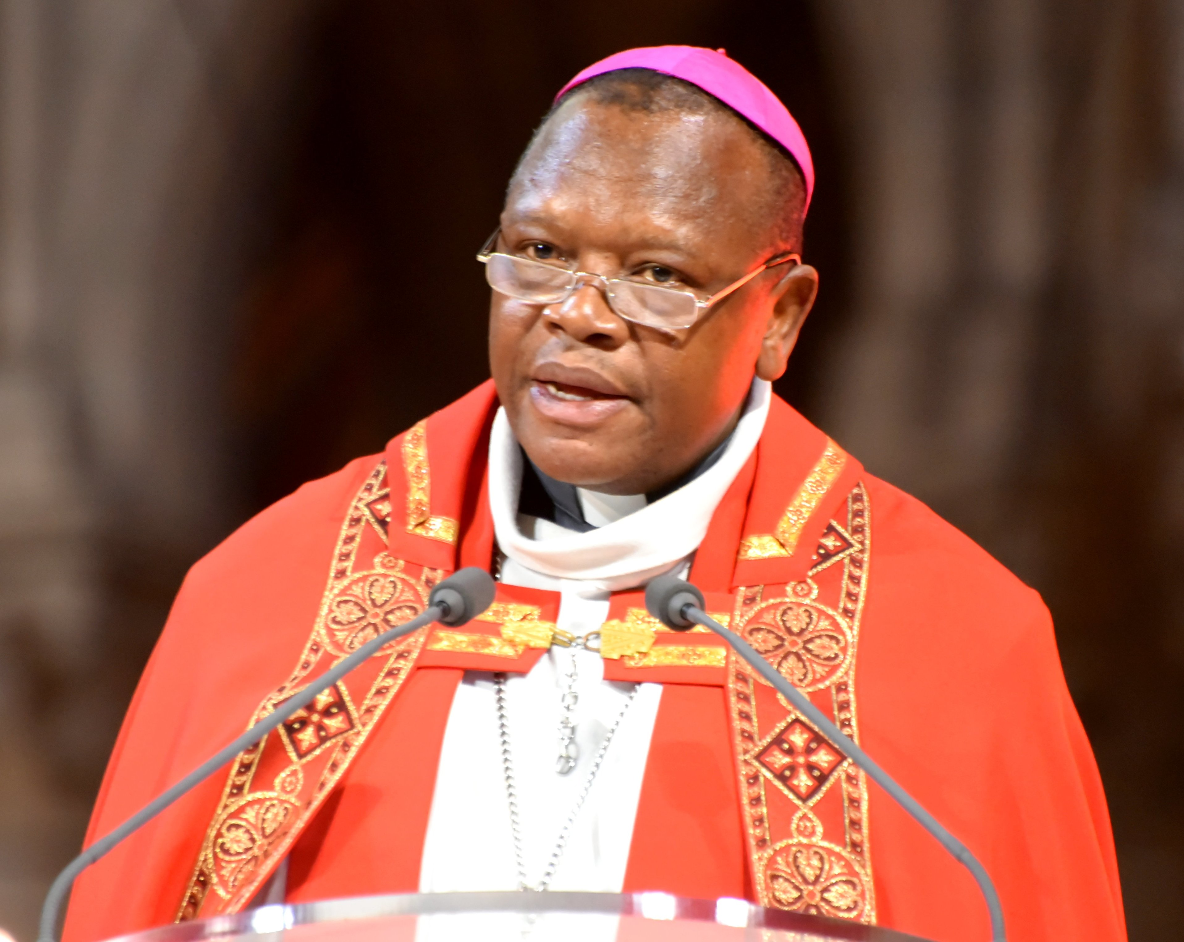 Mgr Fridolin Ambongo lors de la 11ème Nuit des Témoins d'Aide à l'Église en Détresse à Paris.